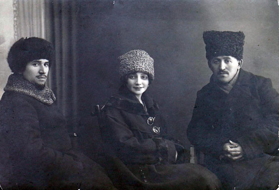 Слева направо: М.Х. Султан-Галиев, его супруга Ф. Ерзина, И.К. Фирдевс